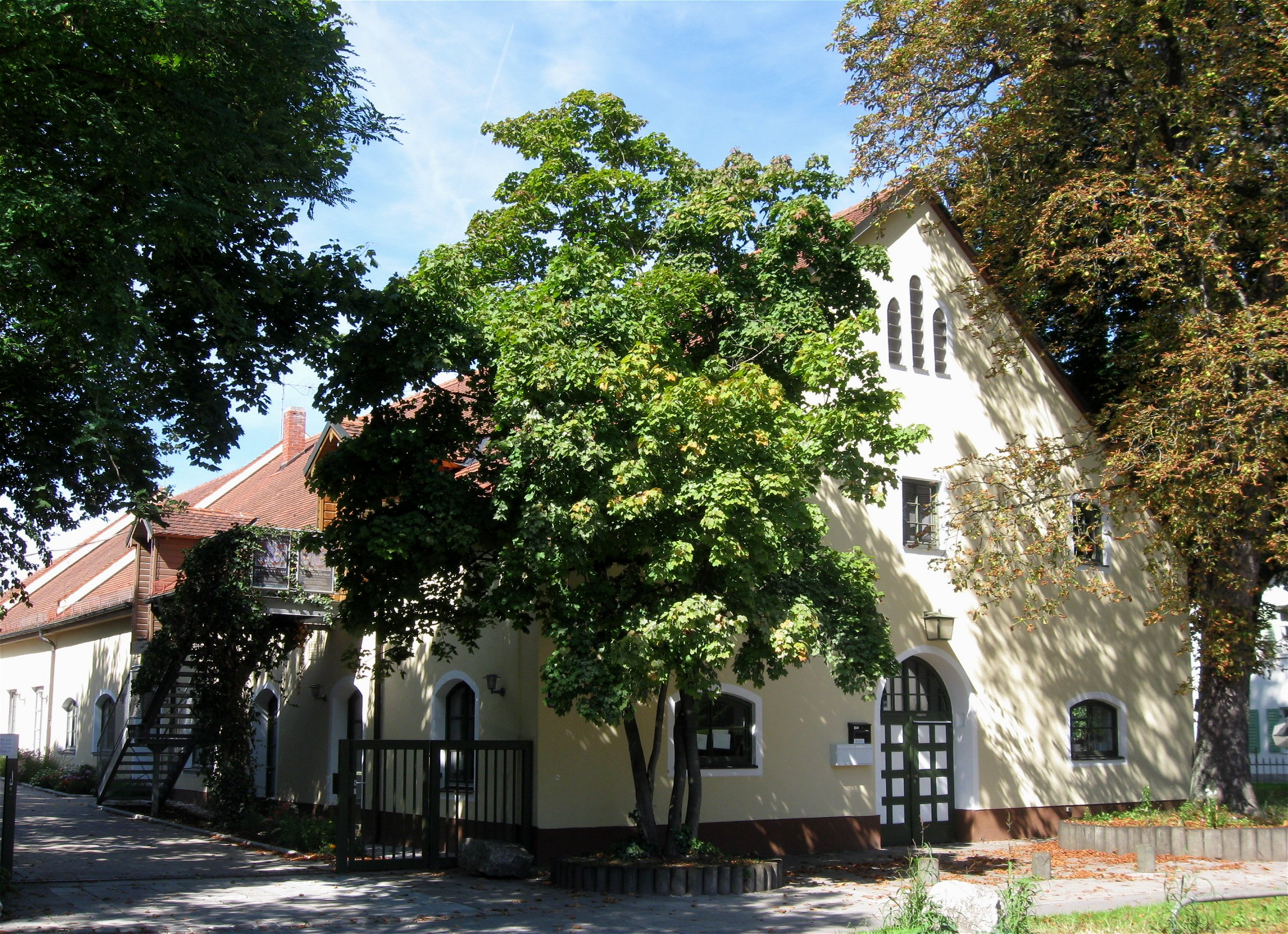 Situlistraße 73; Ehem. Stallgebäude von Nr. 75, innen Gewölbe, wohl 19. Jh.